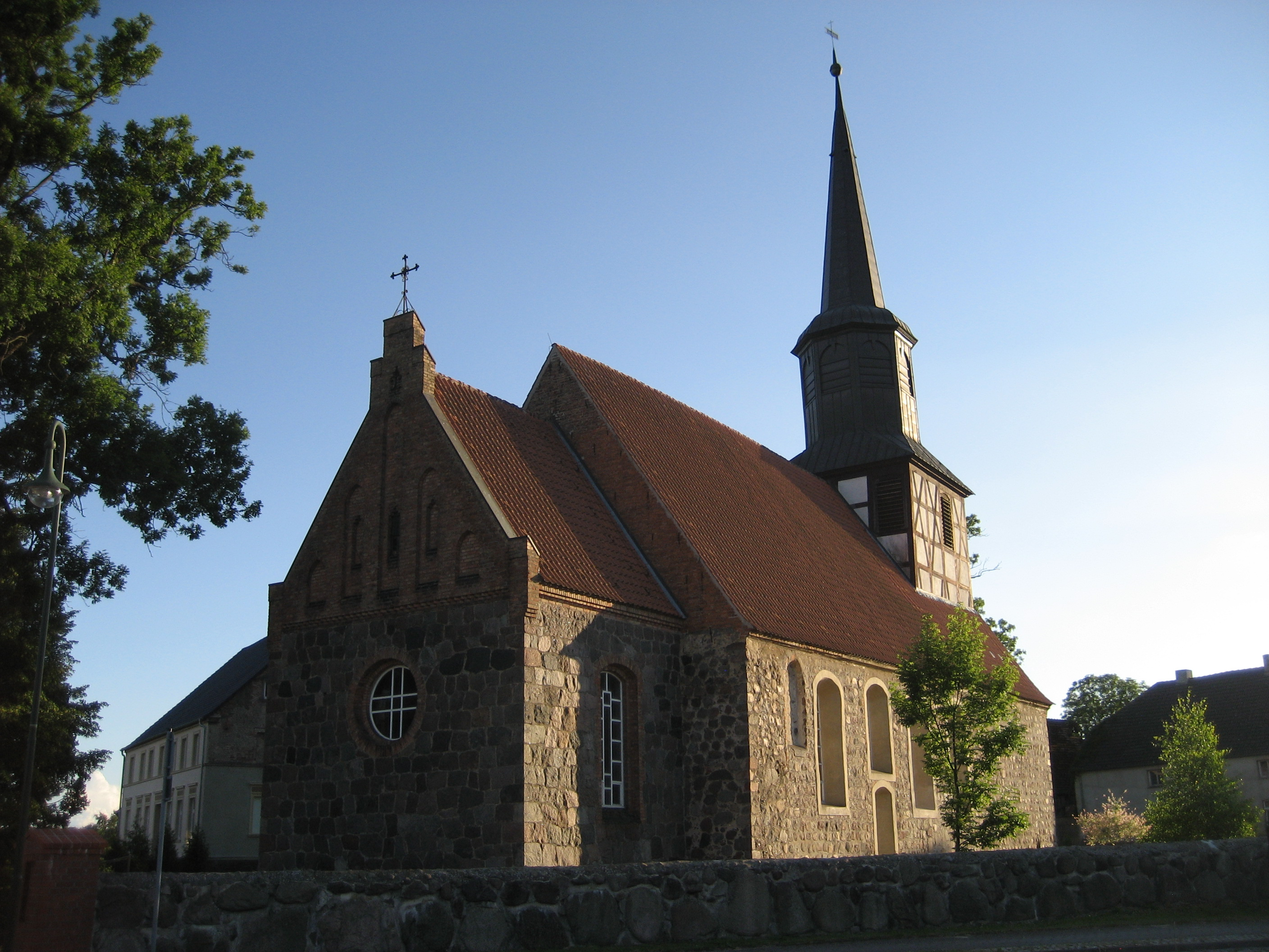 Kirche Rossow aus Blickrichtung Nordosten.